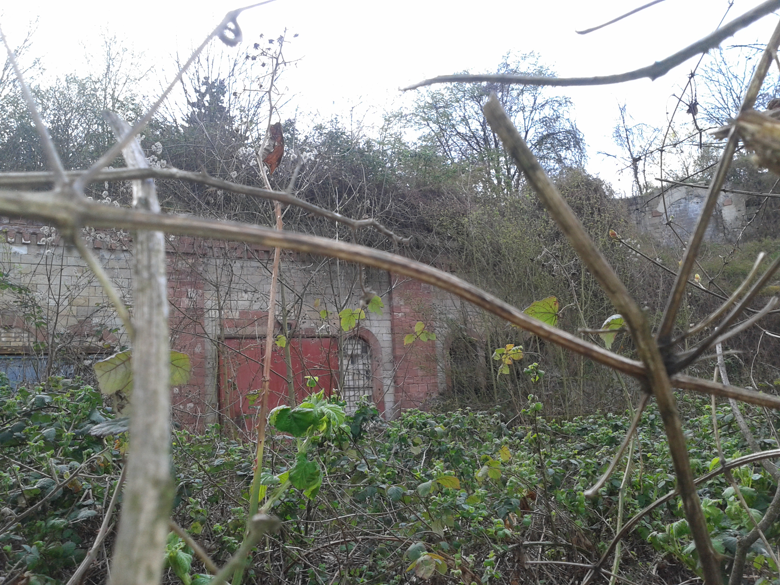 Baudenkmal Fort Hartenberg in Mainz